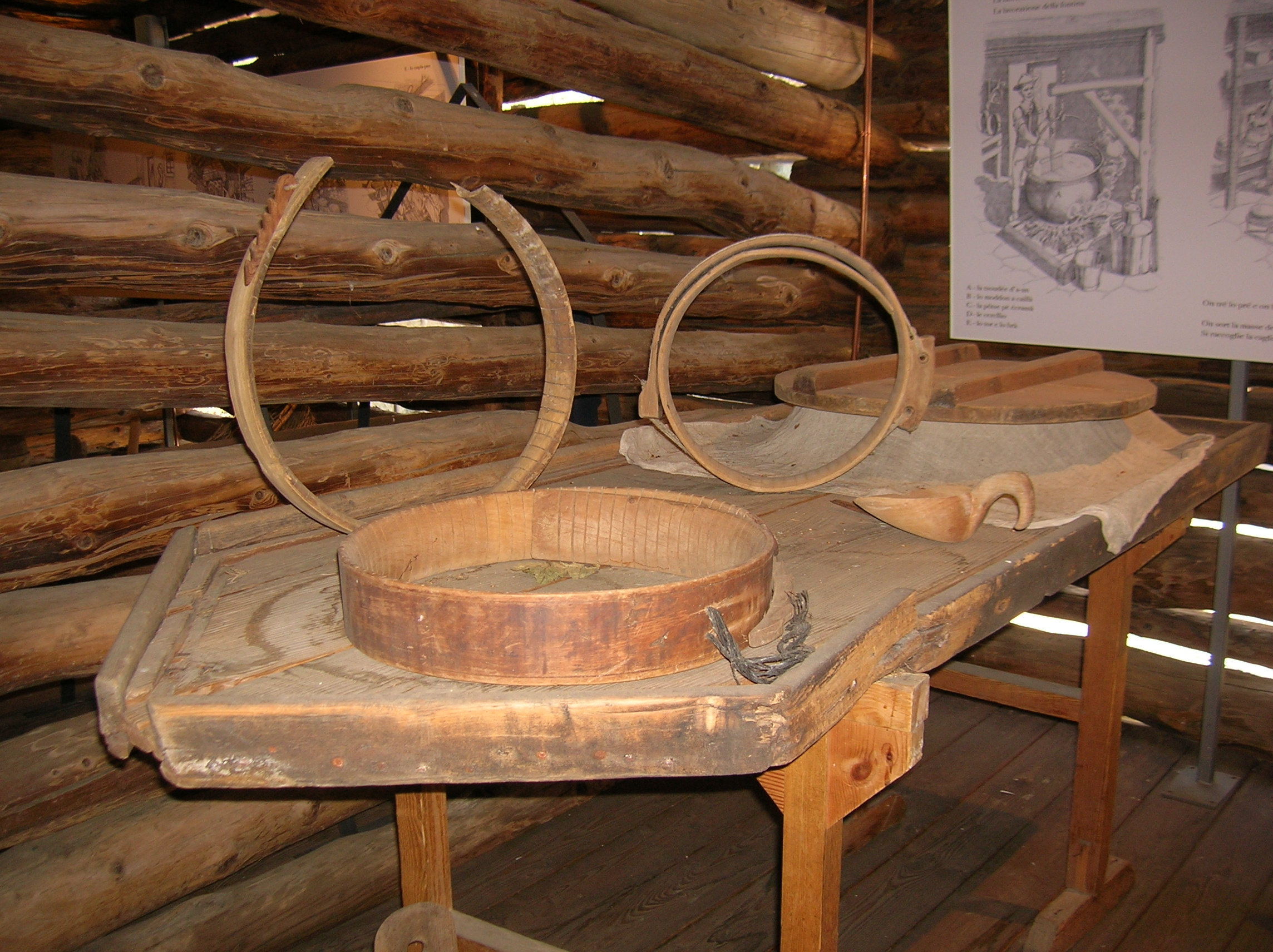 Fascere esposte nel Museo etnografico "Petit Monde", museo etnografico sulla civiltà contadina di montagna in località Triatel di Torgnon, Valle d'Aosta, Italia. Le fascere sono usate durante il processo tradizionale di fabbricazione della fontina. La fascera è composta di un cerchio di faggio (o altro legno) con delle tacche all'interno per renderlo flessibile e un sistema di chiusura di legno e corda a tirante; la fascera era ed è usata per tenere la cagliata durante la pressatura per far fuoriuscire il siero.